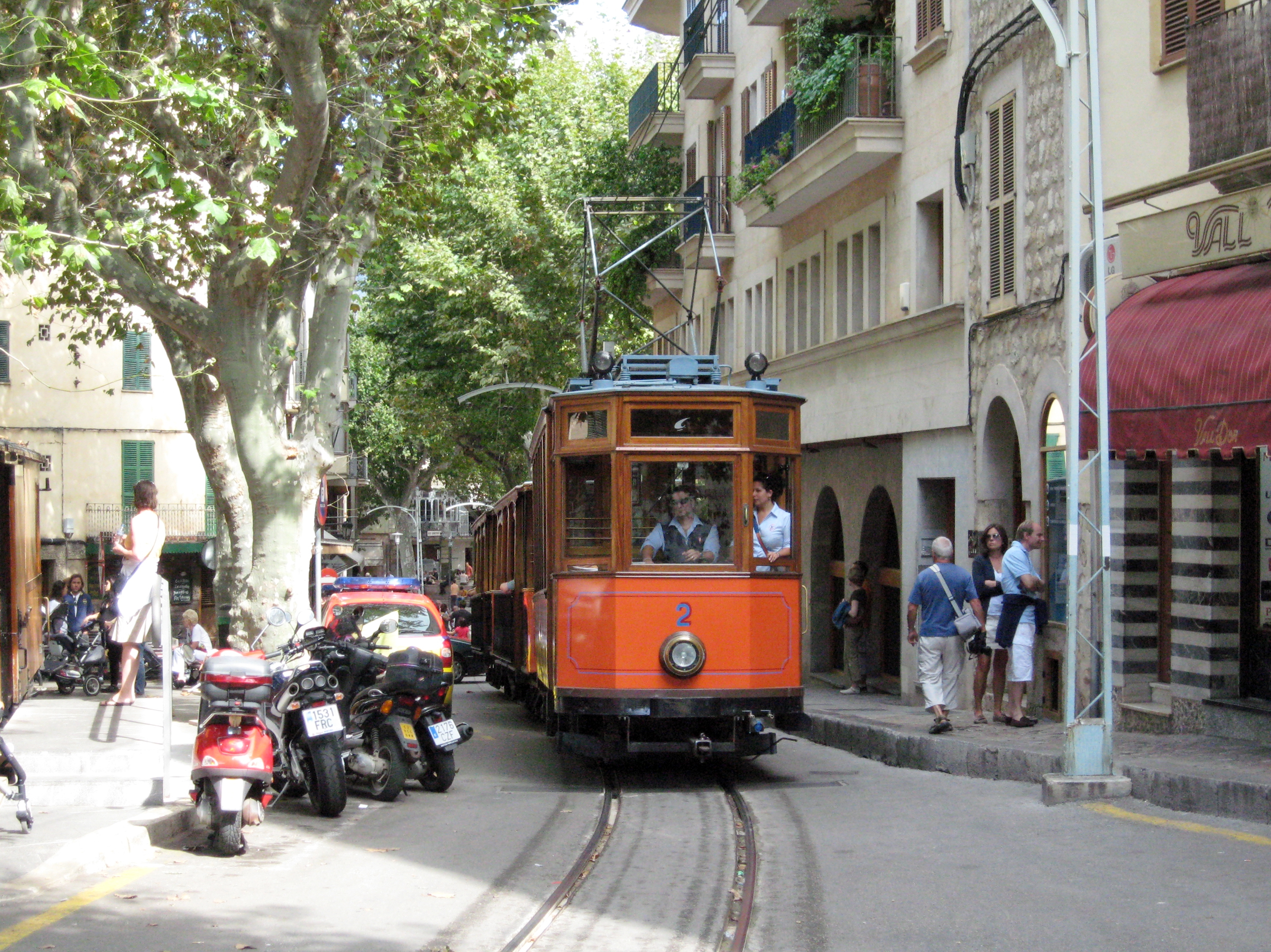 Sóller, Mallorca, Spanien